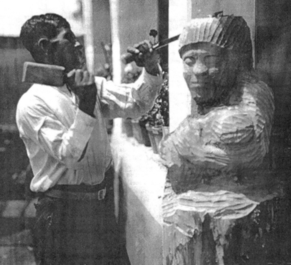 Mardonio Magaña tallando